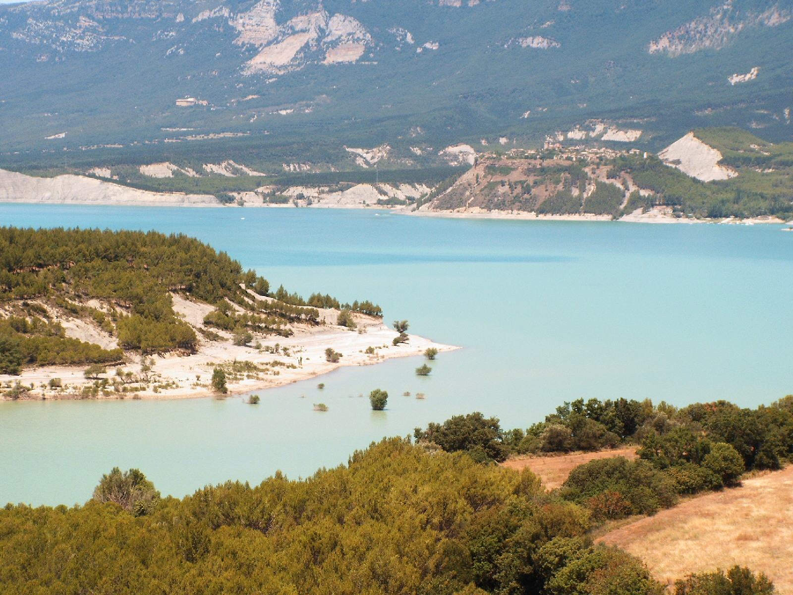 Vista del pantano de Yesa desde la localidad abandonada de Ruesta.